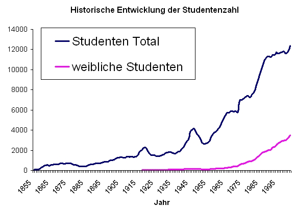 Historische Entwicklung der Studentenzahl der Eidgenössische Technische Hochschule Zürich author: philtime